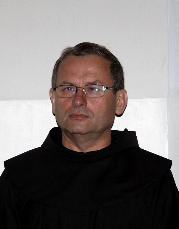 O. Antonin Brząkalik OFM